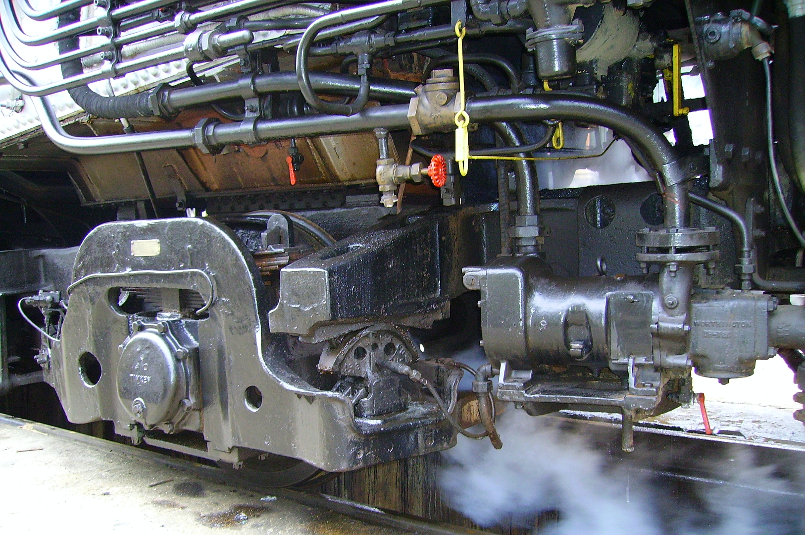 Le bissel Delta et la turbopompe d'alimentation en eau de la 141 R 1199 (dépôt de Villeneuve-Saint-Georges le 05 mai 2007).